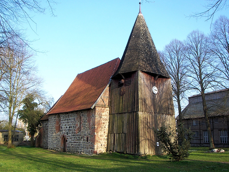 Kirche in Roggendorf, Landkreis Nordwestmecklenburg